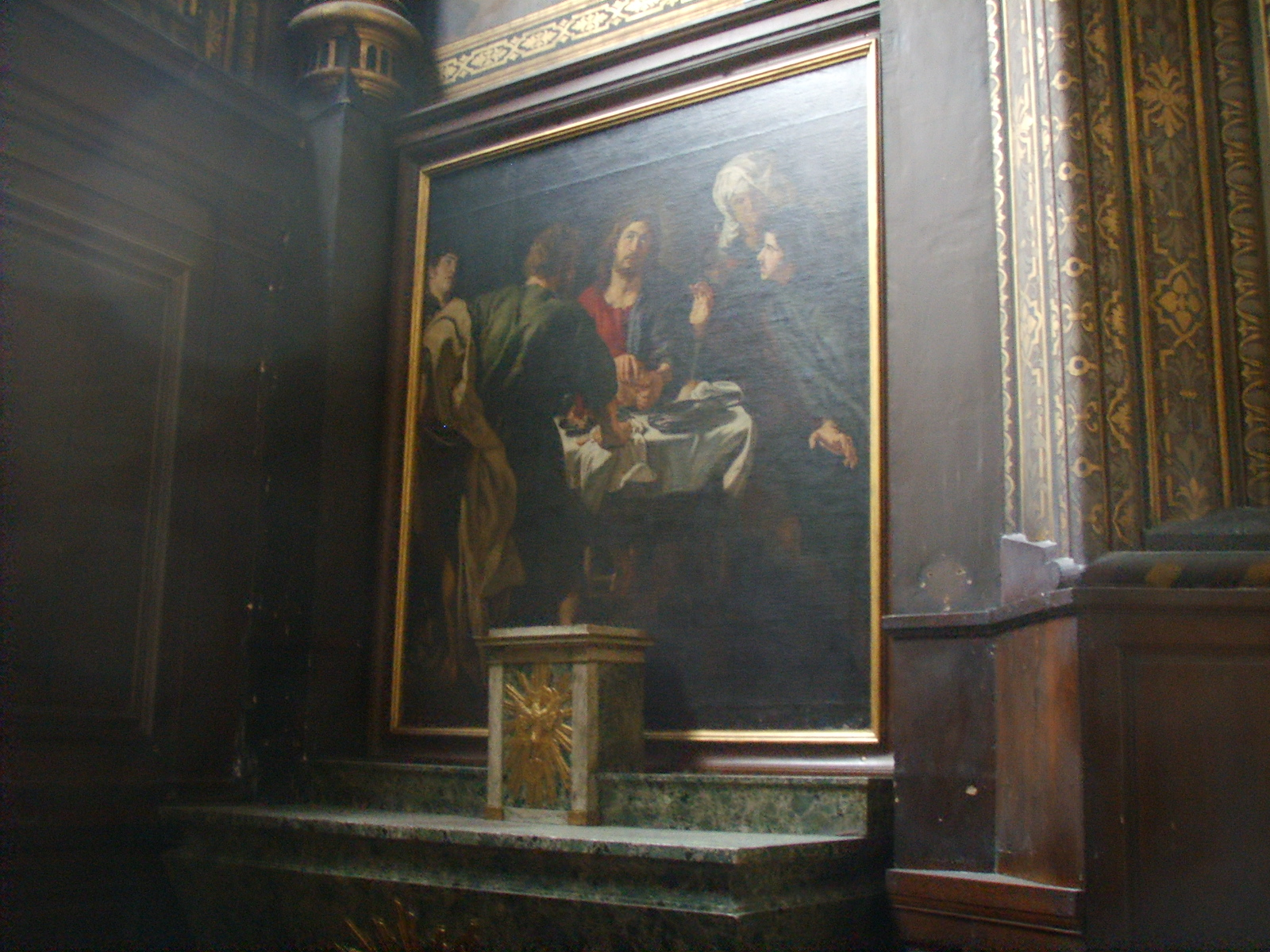 Église_di_Saint_Eustache cena_di_emmaus_di_rubens